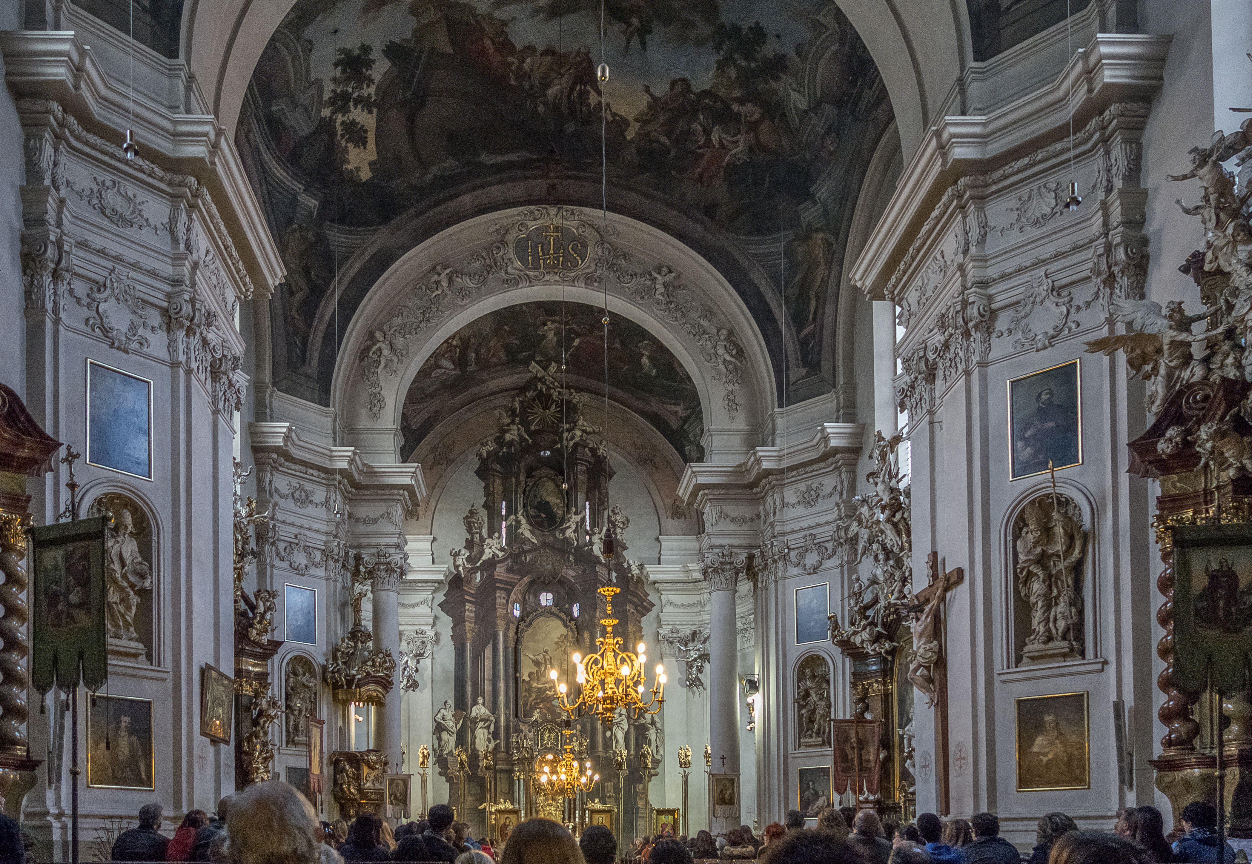 Grekokatolicka katedra św. Klemensa